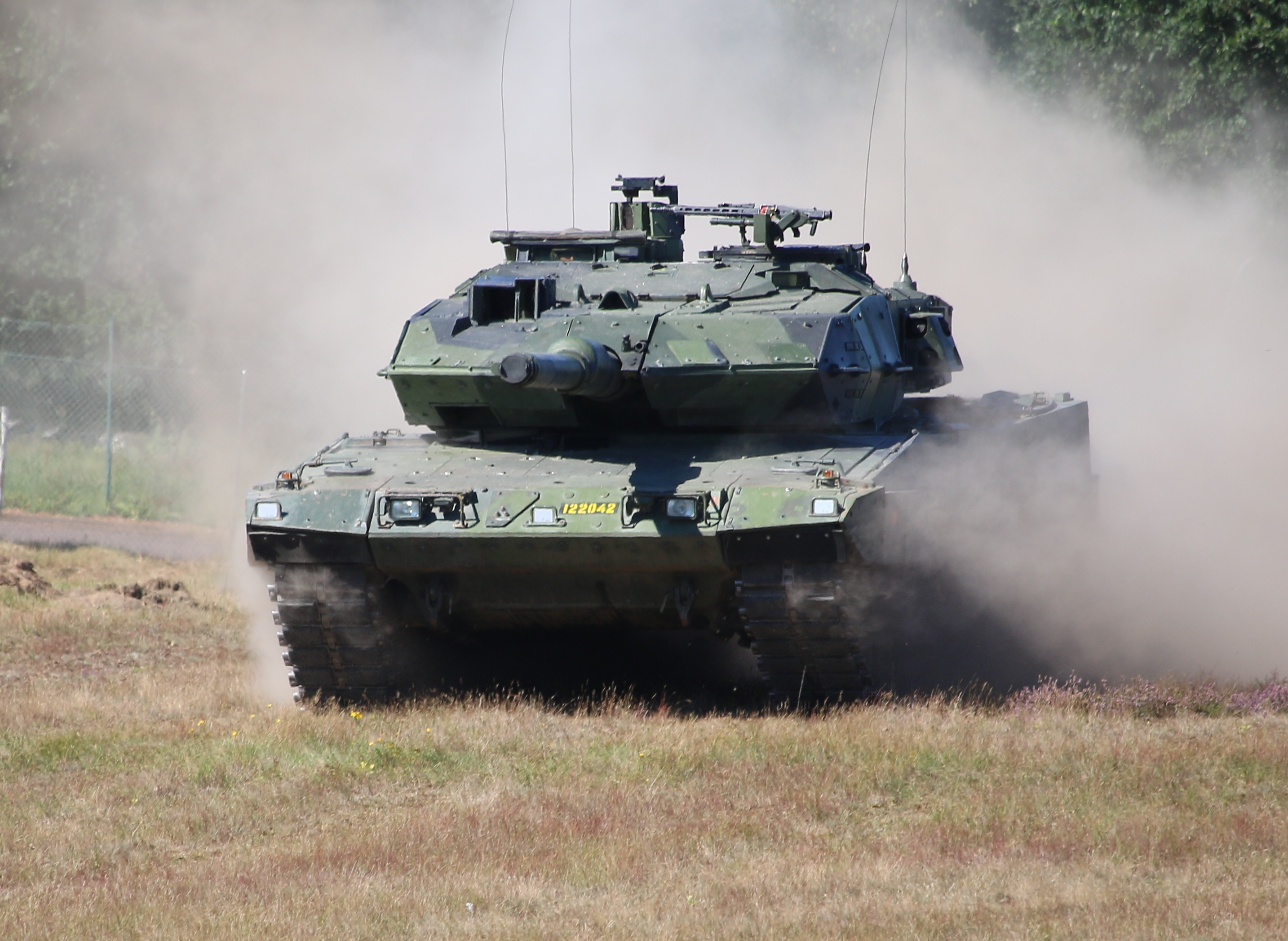 Stridsvagn 122 Revinge 2016